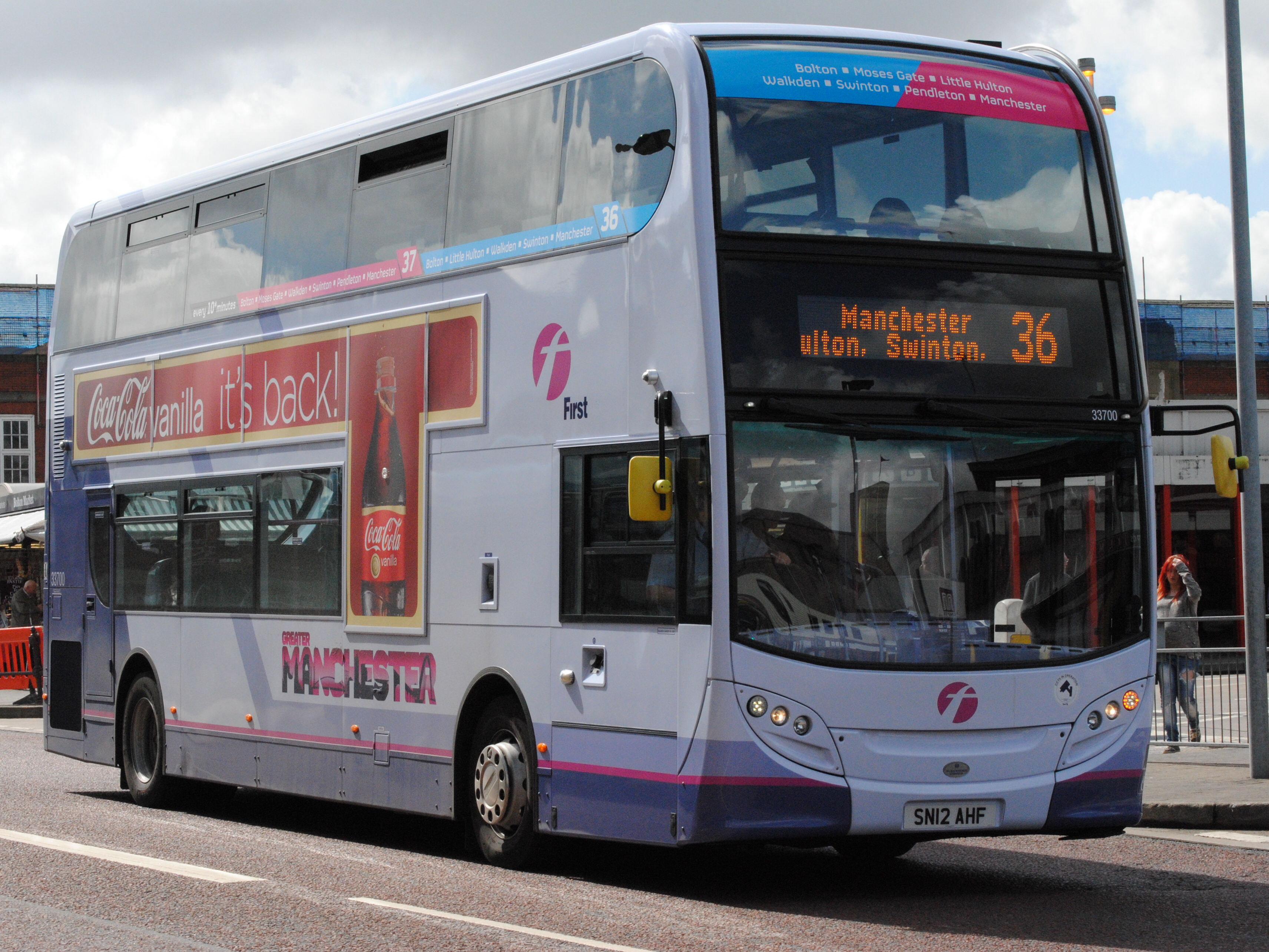 Alexander Dennis Enviro 400